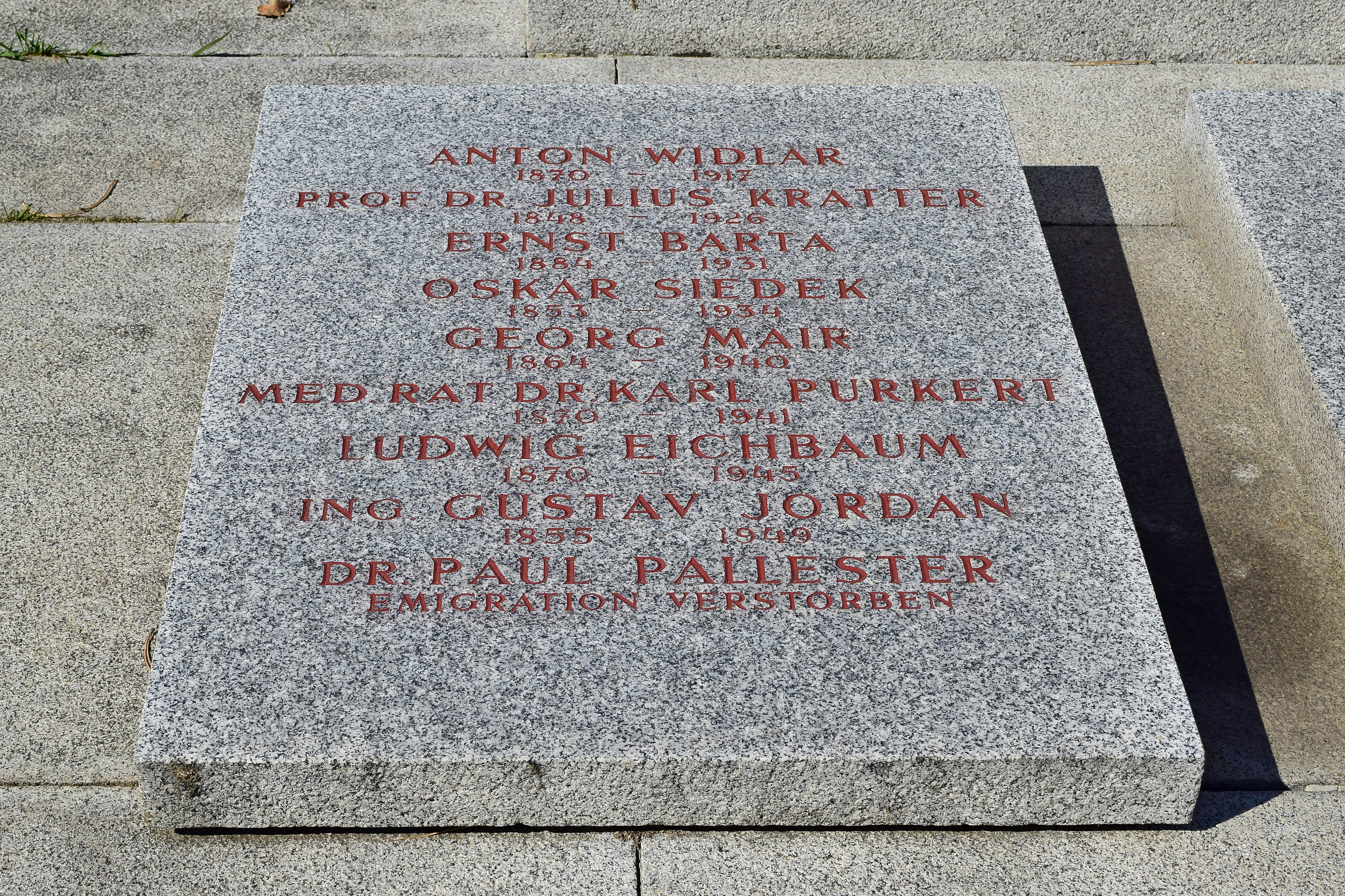 Denkmal für die Vorkämpfer der Feuerbestattung in Österreich auf dem Urnenhain der Feuerhalle Simmering